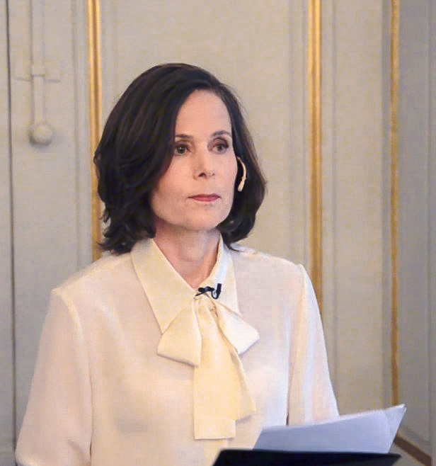 Ständige sekreteraren i Svenska Akademien Sara Danius tillkännager Nobelpriset i litteratur 2016 i Börshuset i Stockholm. Pristagare: Bob Dylan.